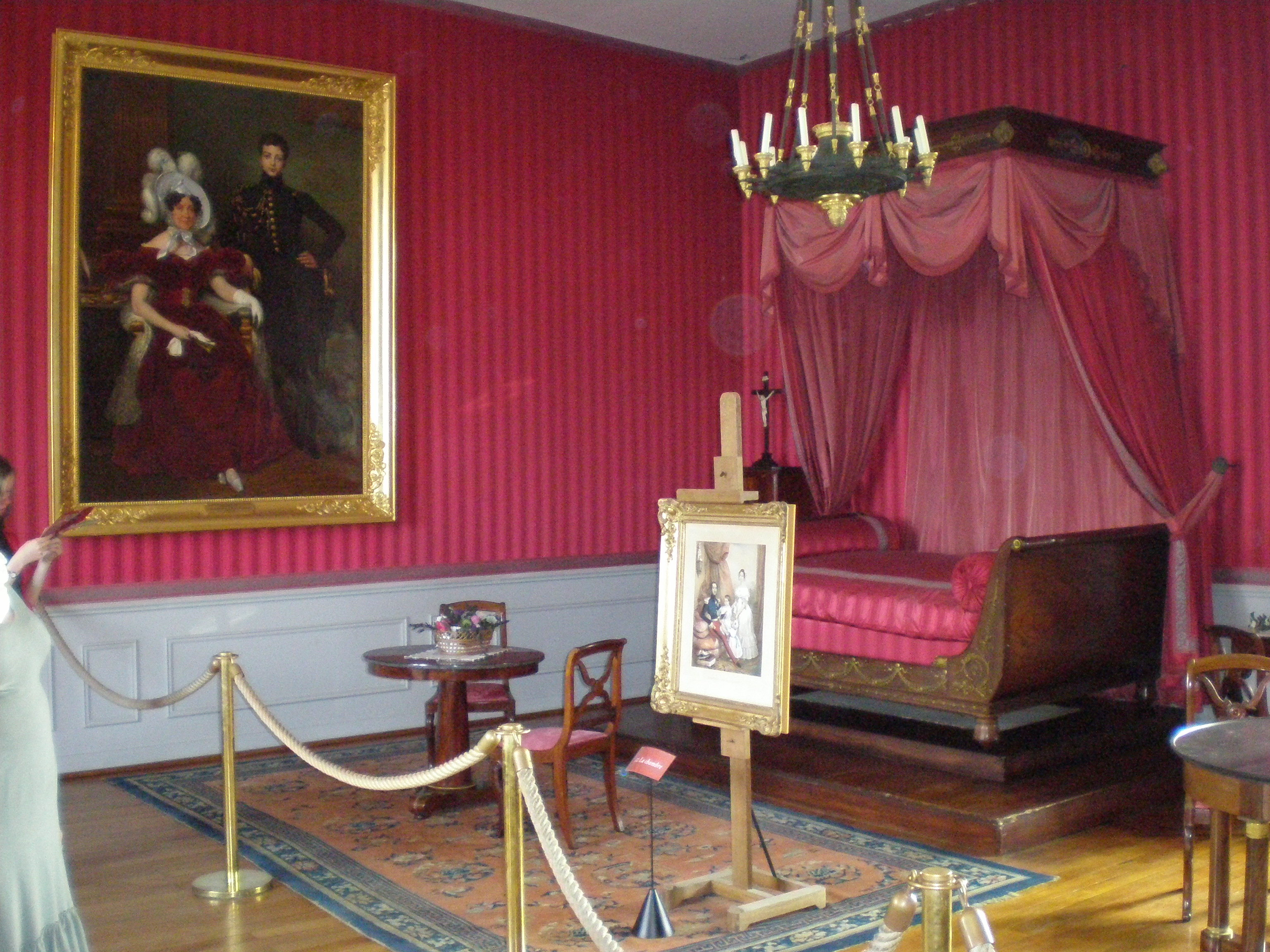 Lit de travers en bateau d'époque Empire, chambre à coucher, Château d'Amboise, France.